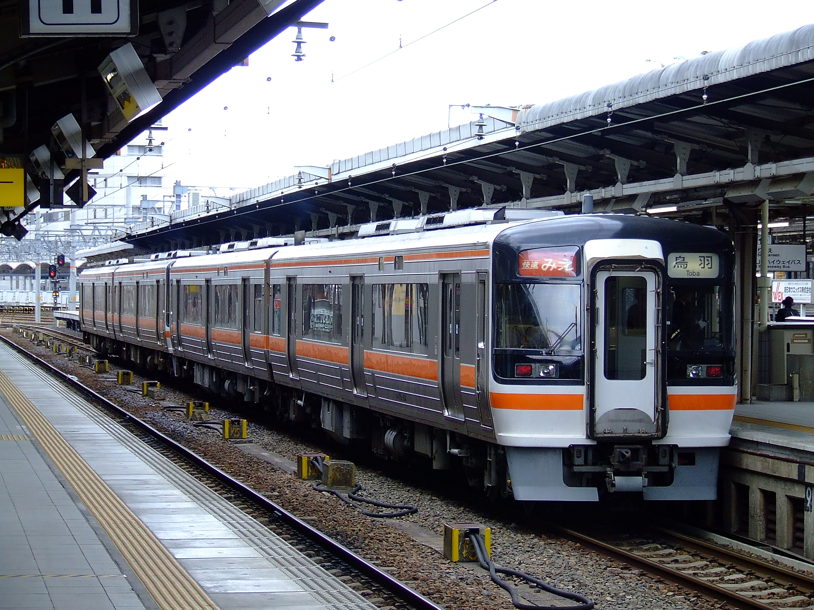 JR東海キハ75系気動車 快速みえ 名古屋駅にて